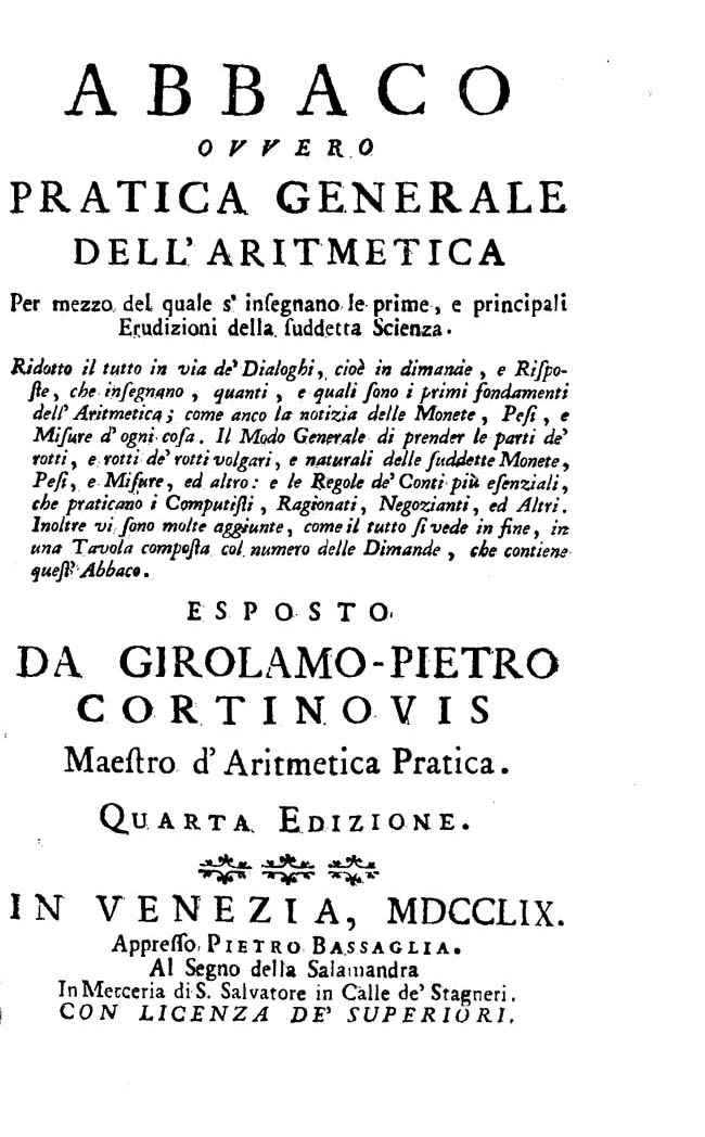 Abbaco ovvero Pratica generale dell'Aritmetica per mezzo del quale s'insegnano le prime, e principali erudizioni della suddetta scienza. ... Esposto da Girolamo-Pietro Cortinovis …. - In Venezia : appresso Pietro Bassaglia al Segno della salamandra, 1759. - [2], 216 p. ; 8º .